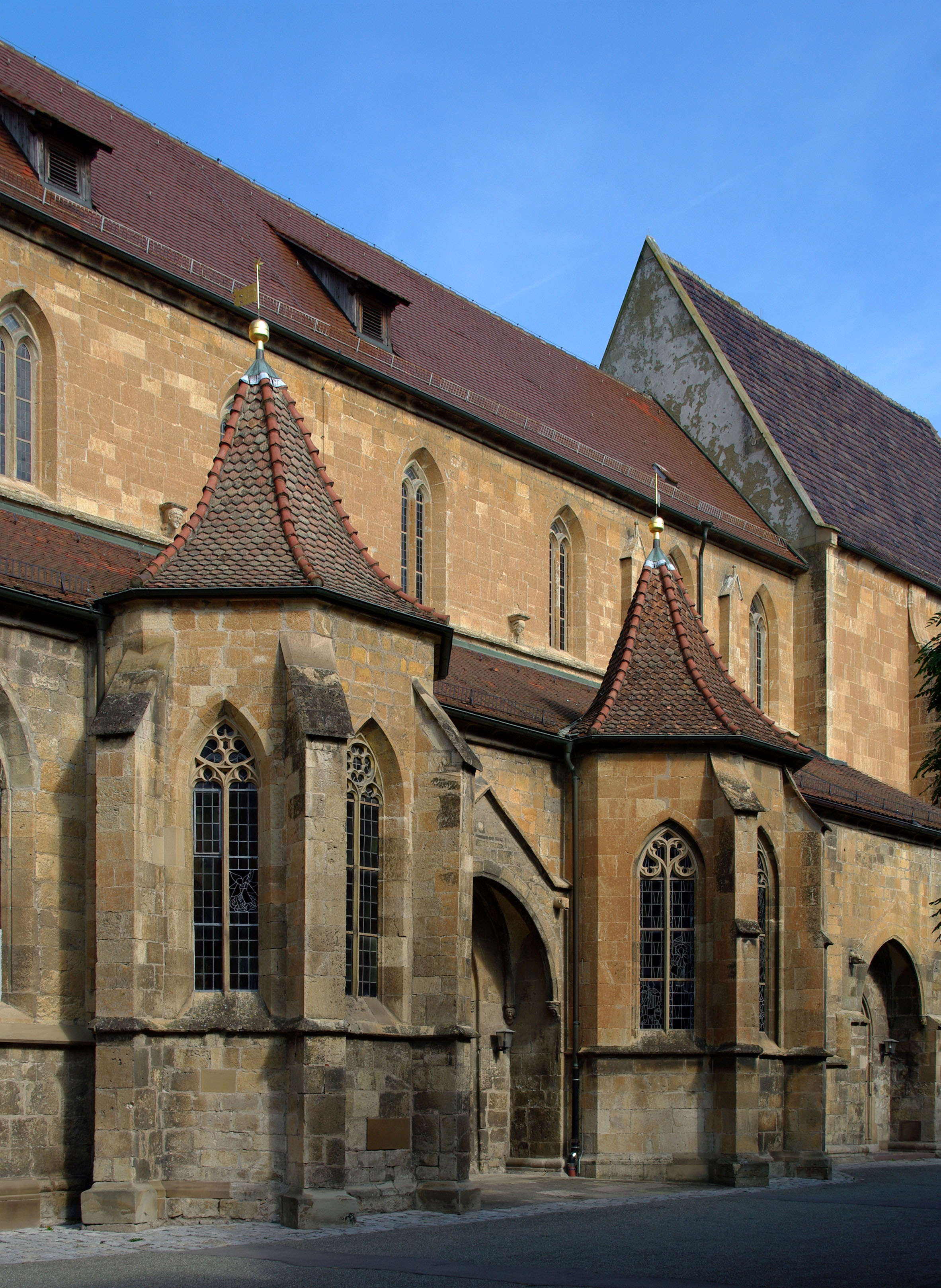 Die zwei Seitenkapellen auf der Südseite der Bartholomäuskirche Markgröningen. Links die Reischachkapelle, rechts die Vollandkapelle (auch Hirtenkapelle) und zwischendrin das mittlere Südportal.